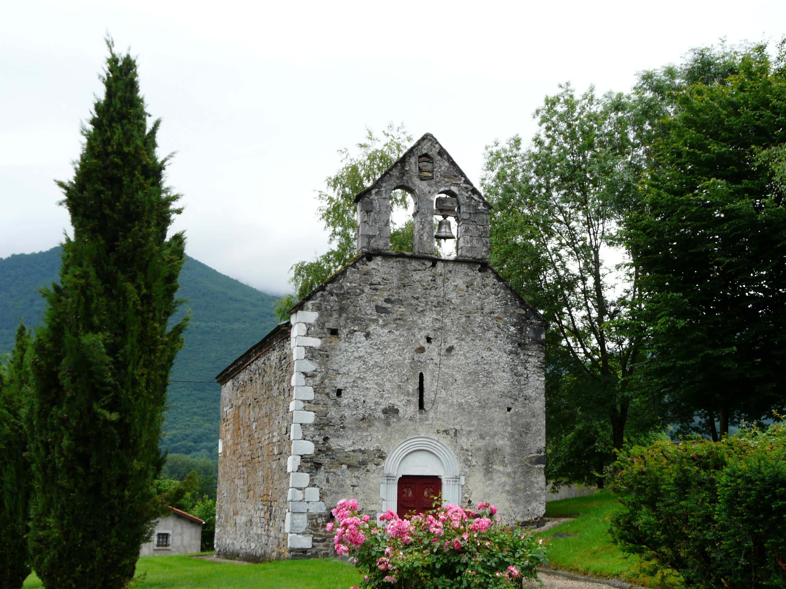 La façade nord de la chapelle Saint-Julien, Saléchan, Hautes-Pyrénées, France.